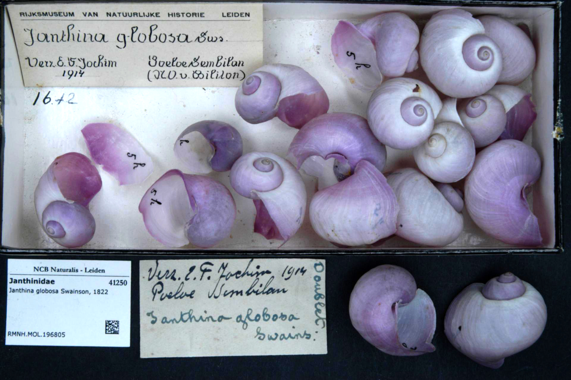 Janthina globosa Swainson, 1822